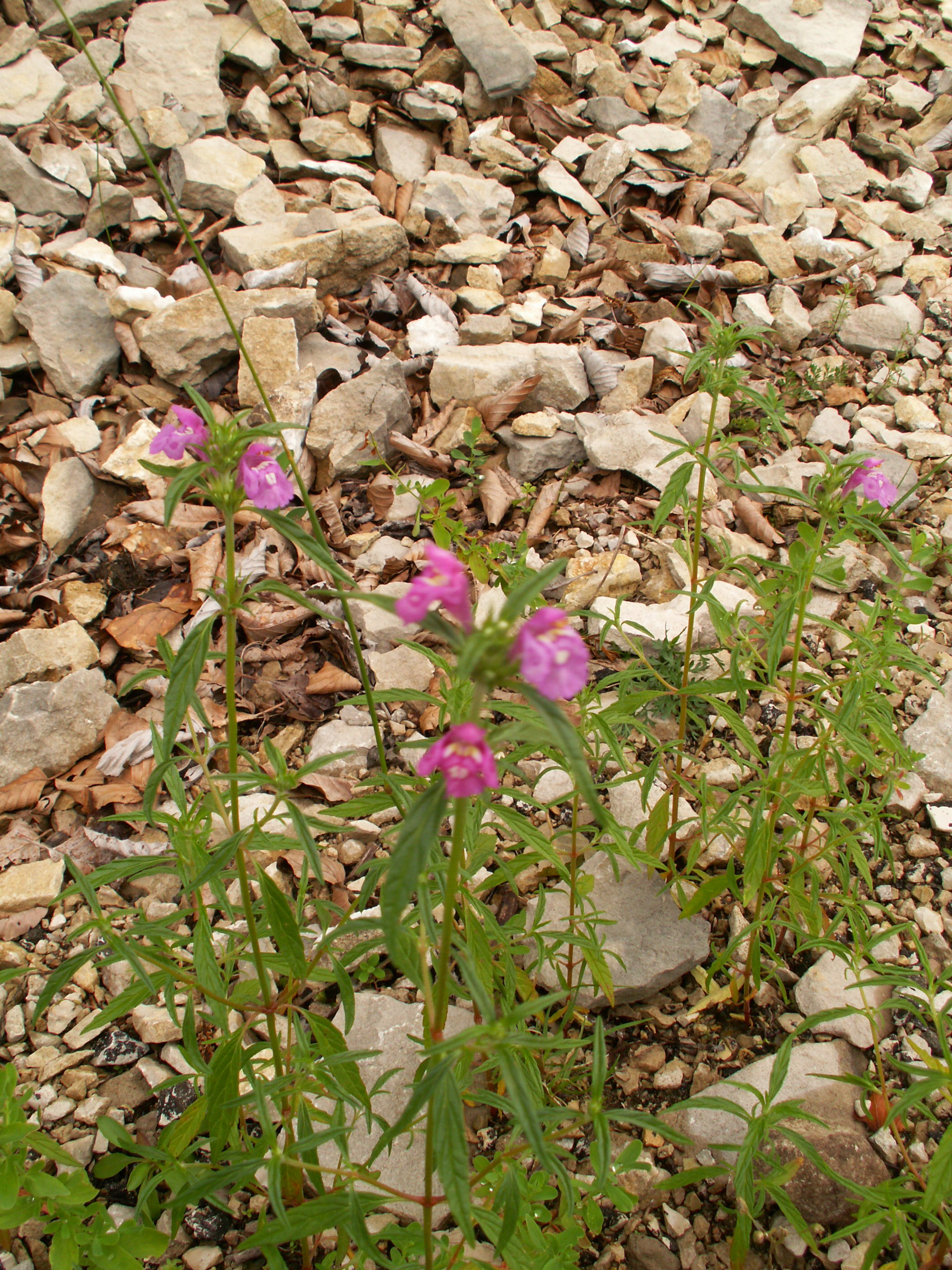 Galeopsis ladanum, à Venasques, France